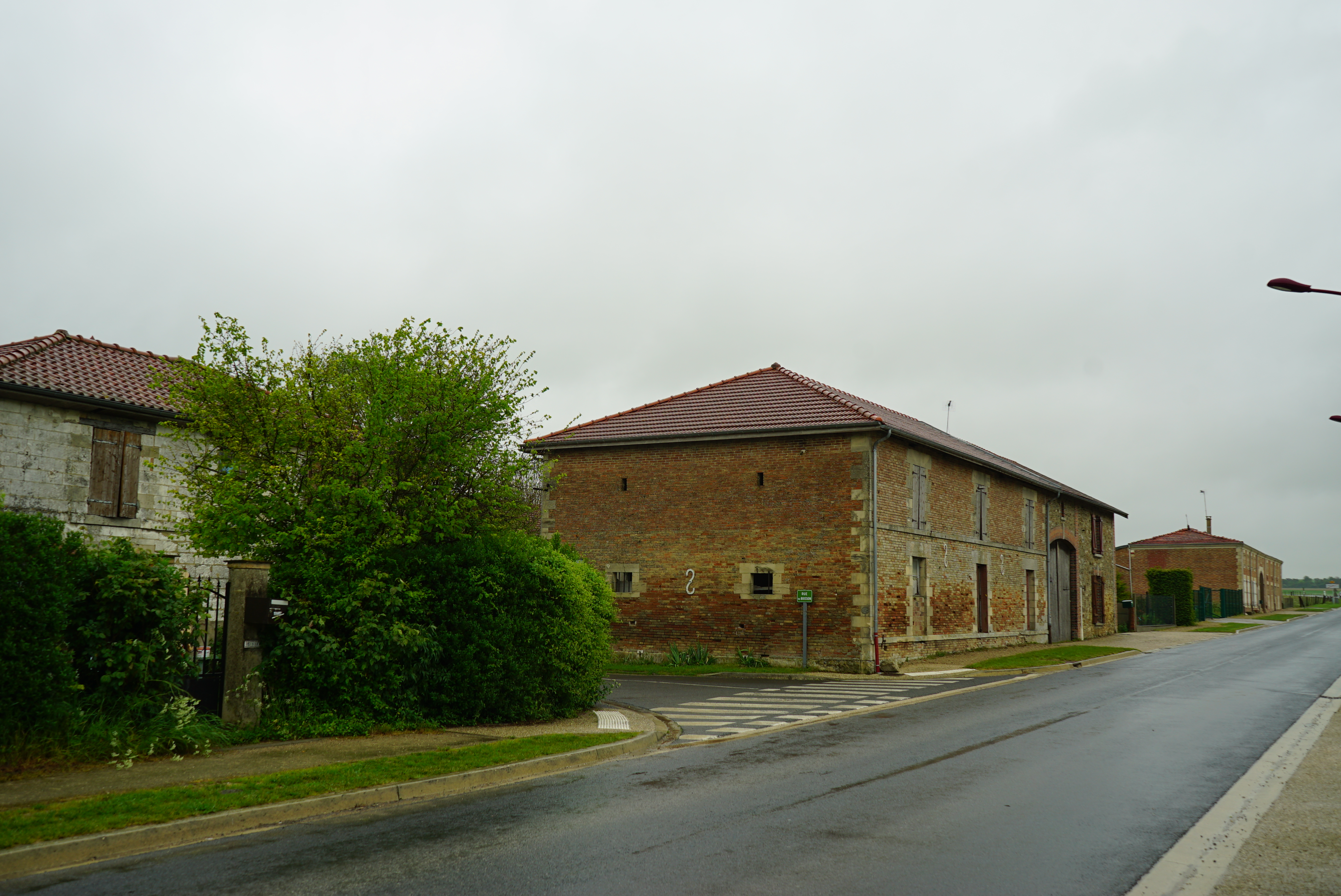 vue du bâtiment.